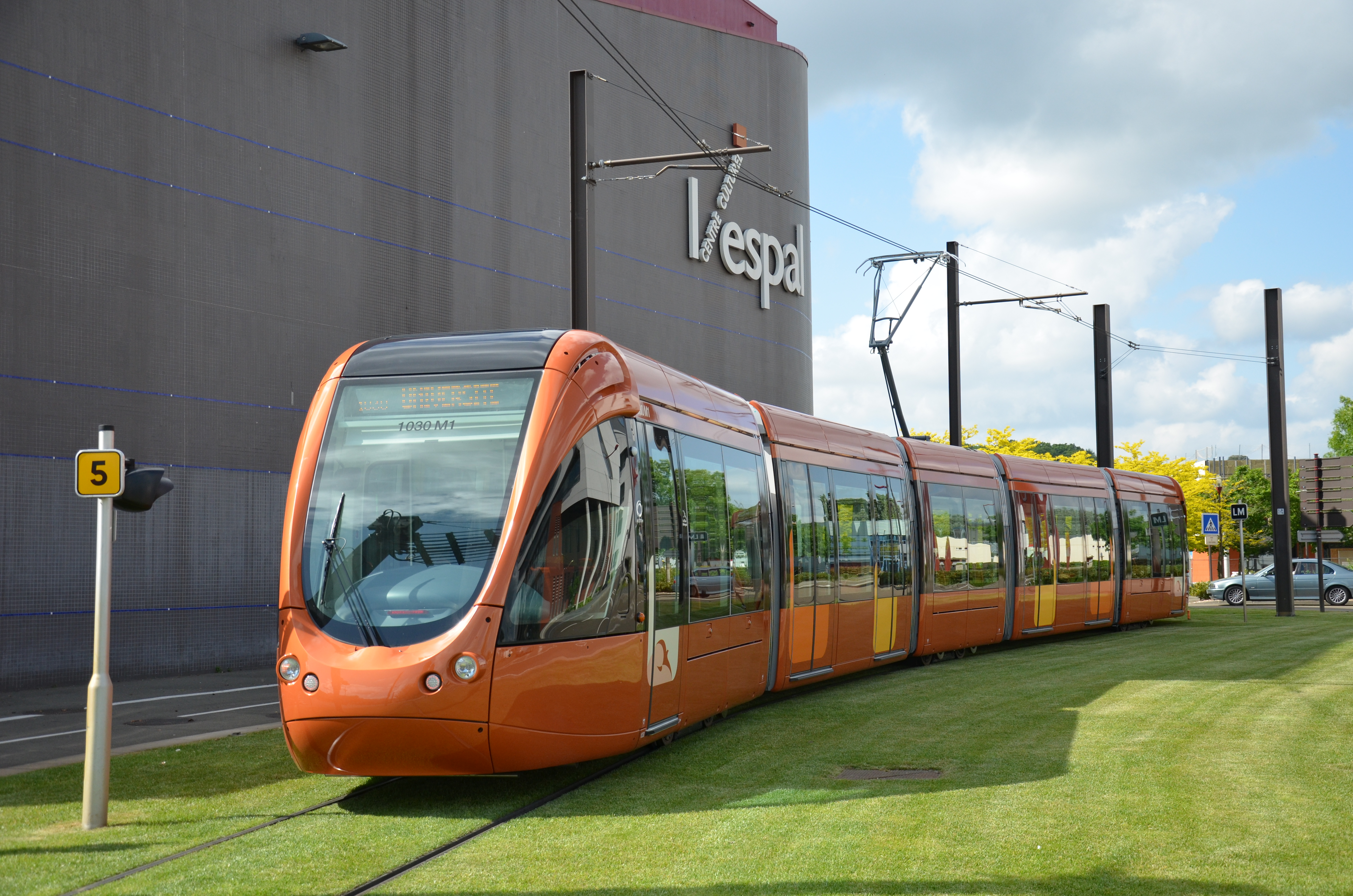 Tramway Alstom Citadis 302 n°1030 au terminus Espal Arche de la Nature.